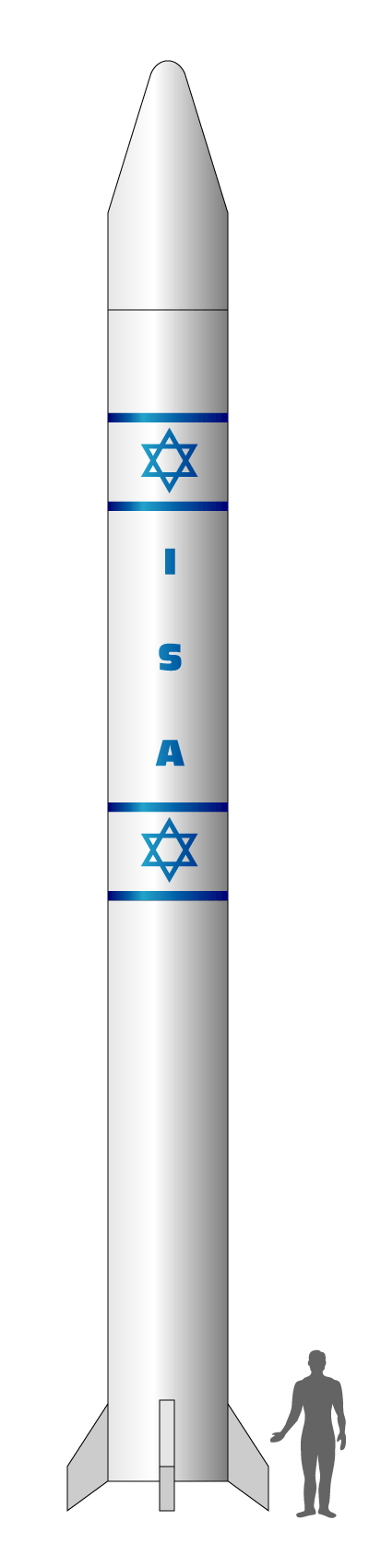 Shavit-Rakete